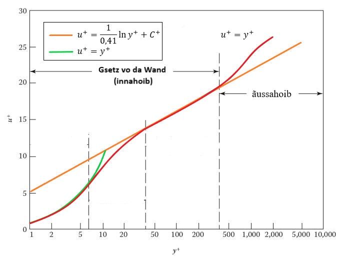 Boarisch: as Gestz vò da Wand